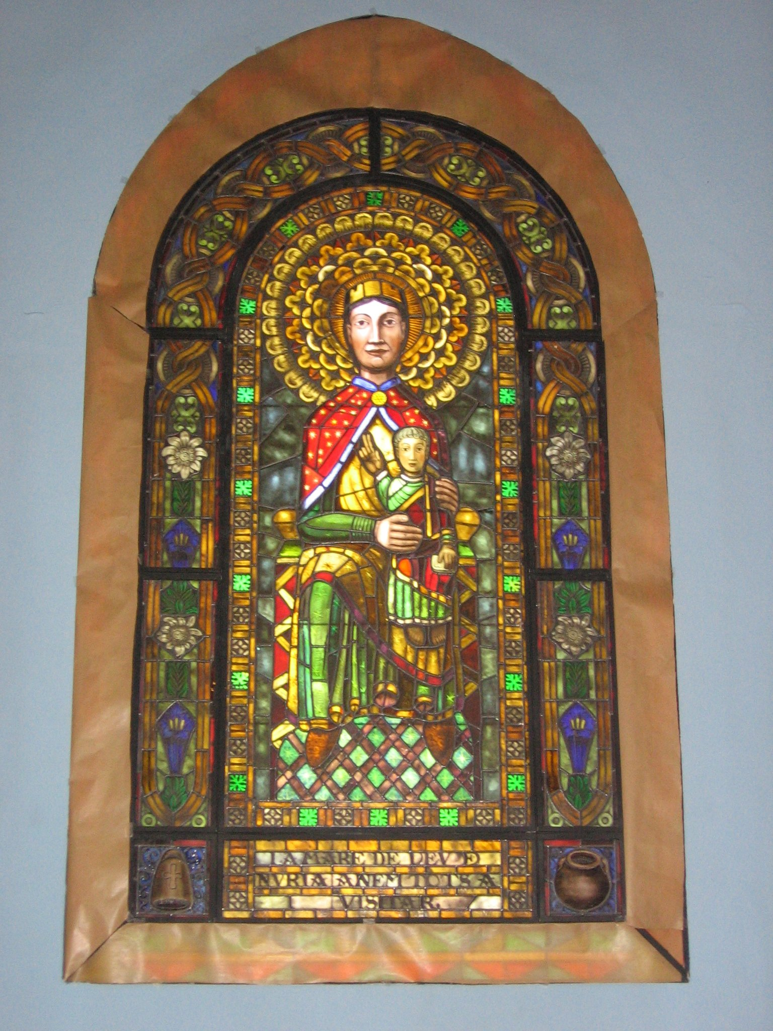 Imagen de la Virgen de Nuria